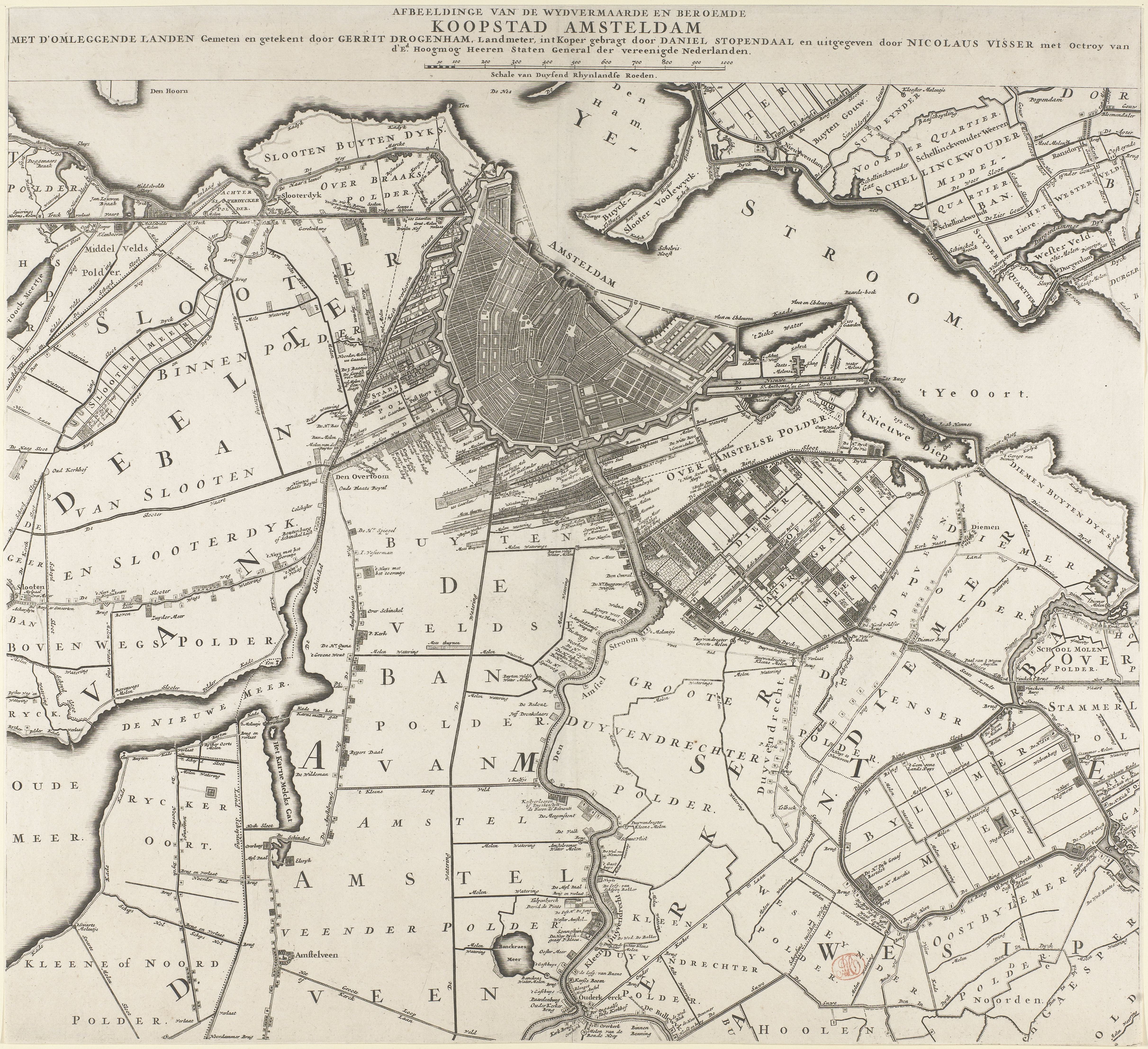 Kaart van Amsterdam en omliggende gebieden (Daniël Stopendael) - Afbeeldinge van de wydvermaarde en beroemde / KOOPSTAD AMSTELDAM / met d'omleggende landen Gemeten en getekent door GERRIT DROGENHAM, Landmeter, int Koper gebragt door DANIEL STOPENDAAL en uitgegeven door NICOLAUS VISSER met Octroy van / d'Ed. Hoogmog. Heeren Staten General der vereenigde Nederlanden. Met schaalverdeling in Rijnlandse roeden.